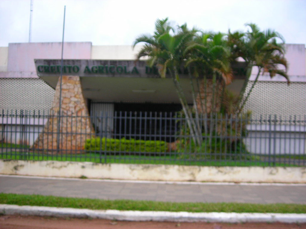 credito